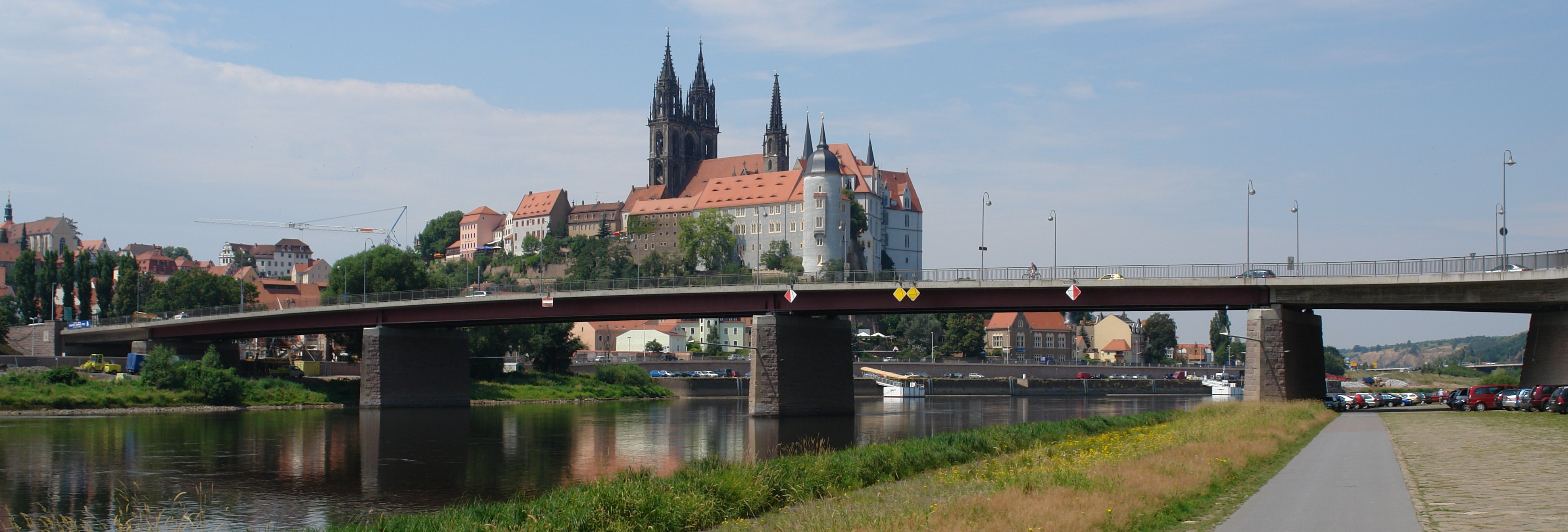 Altstadtbrücke in Meißen, im Hintergrund der Burgberg mit Meißner Dom